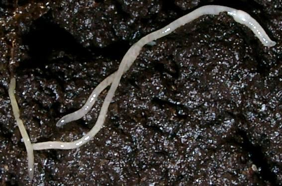 Enchytraeus albidus aus Wurmkultur in Balkonkasten